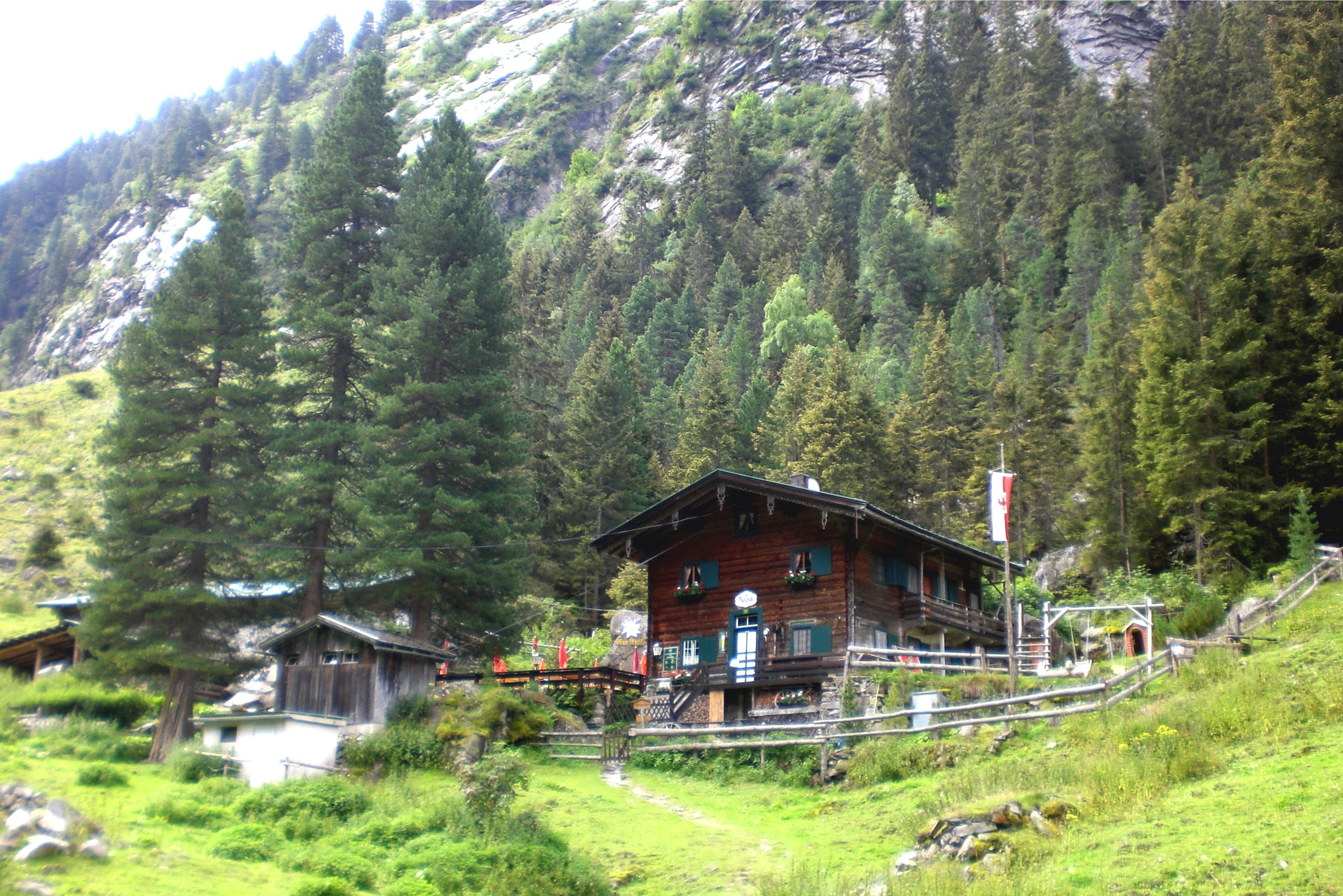 Maxhütte in der Gunggl, Zillertaler Alpen